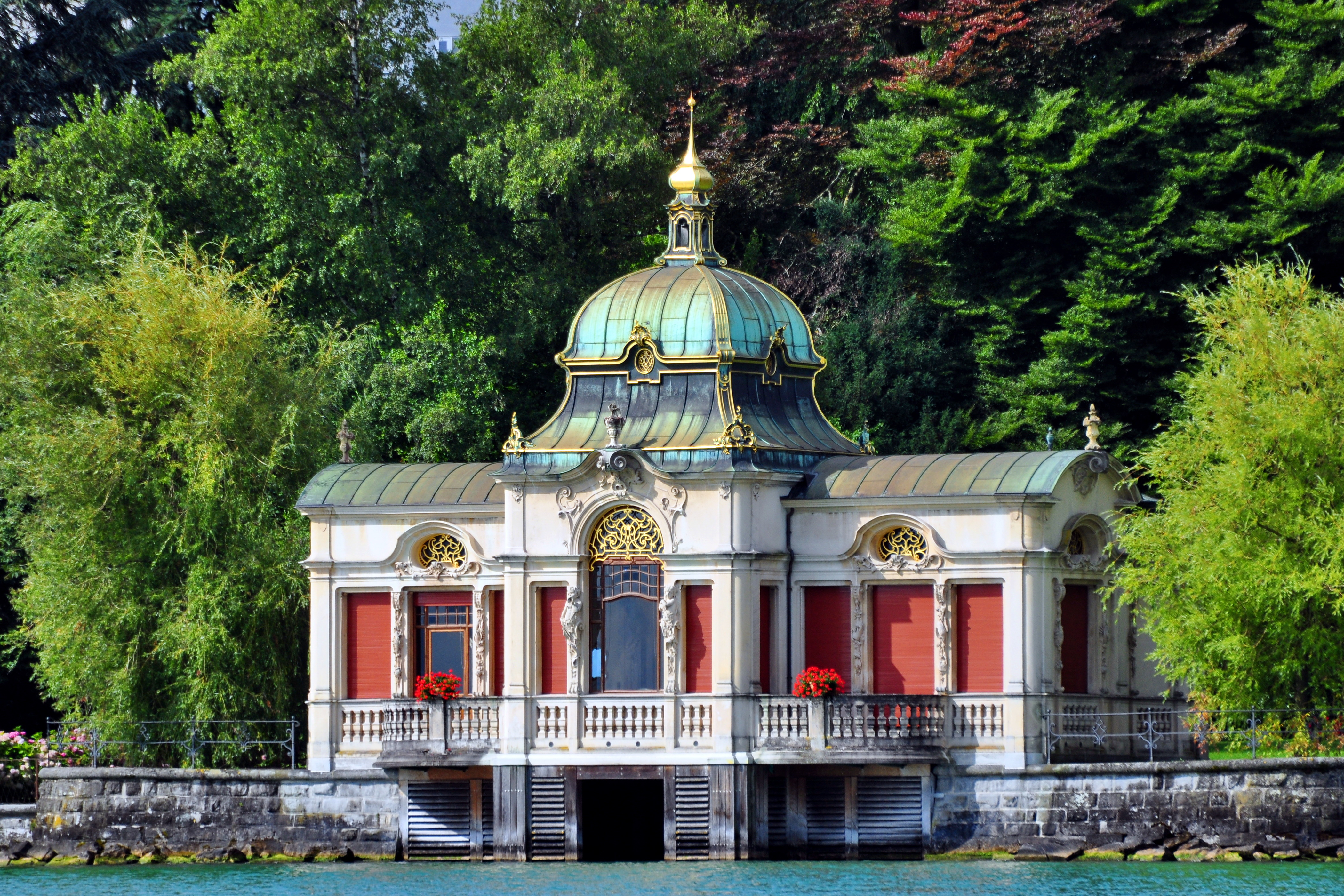 Seepavillon Herner in Horgen (Switzerland) as seen from Zürichsee-Schiffahrtsgesellschaft (ZSG) MS Wädenswil on Zürichsee